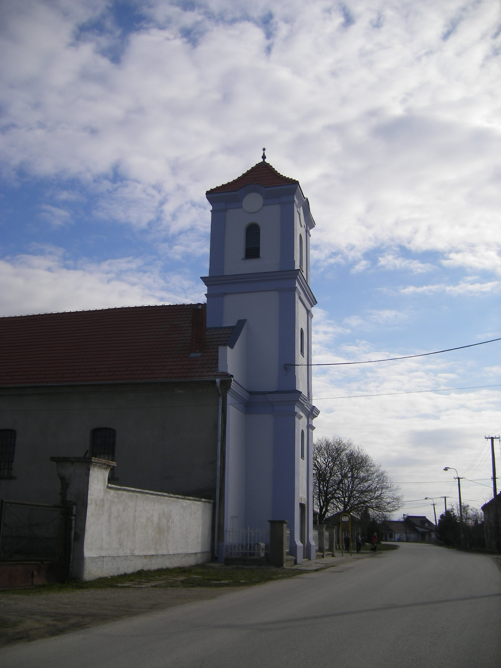 Nagykeszi, református templom